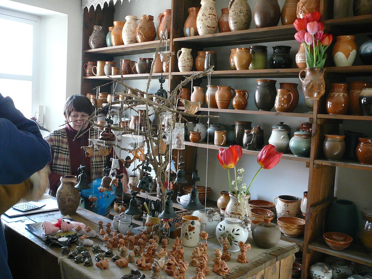 A gift shop in Rumšiškės, Lithuania